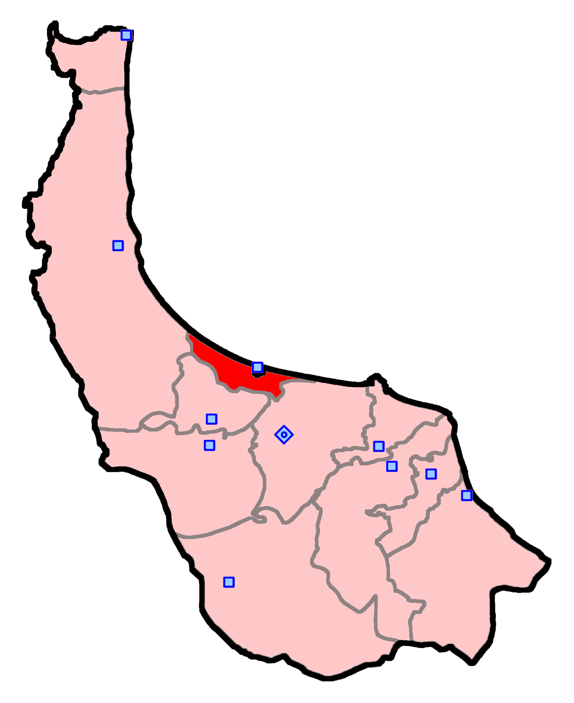 بندرانزلی برای انتخابات مجلس شورای اسلامی